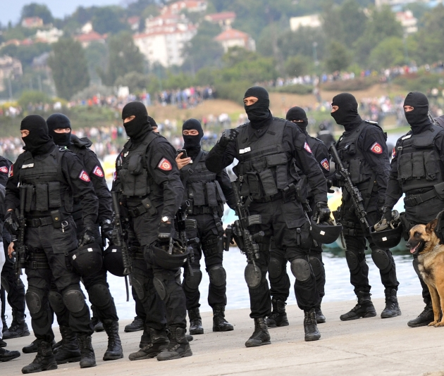 Szerbiaban a ŽANDARMERIJA "CSENDORSEG"